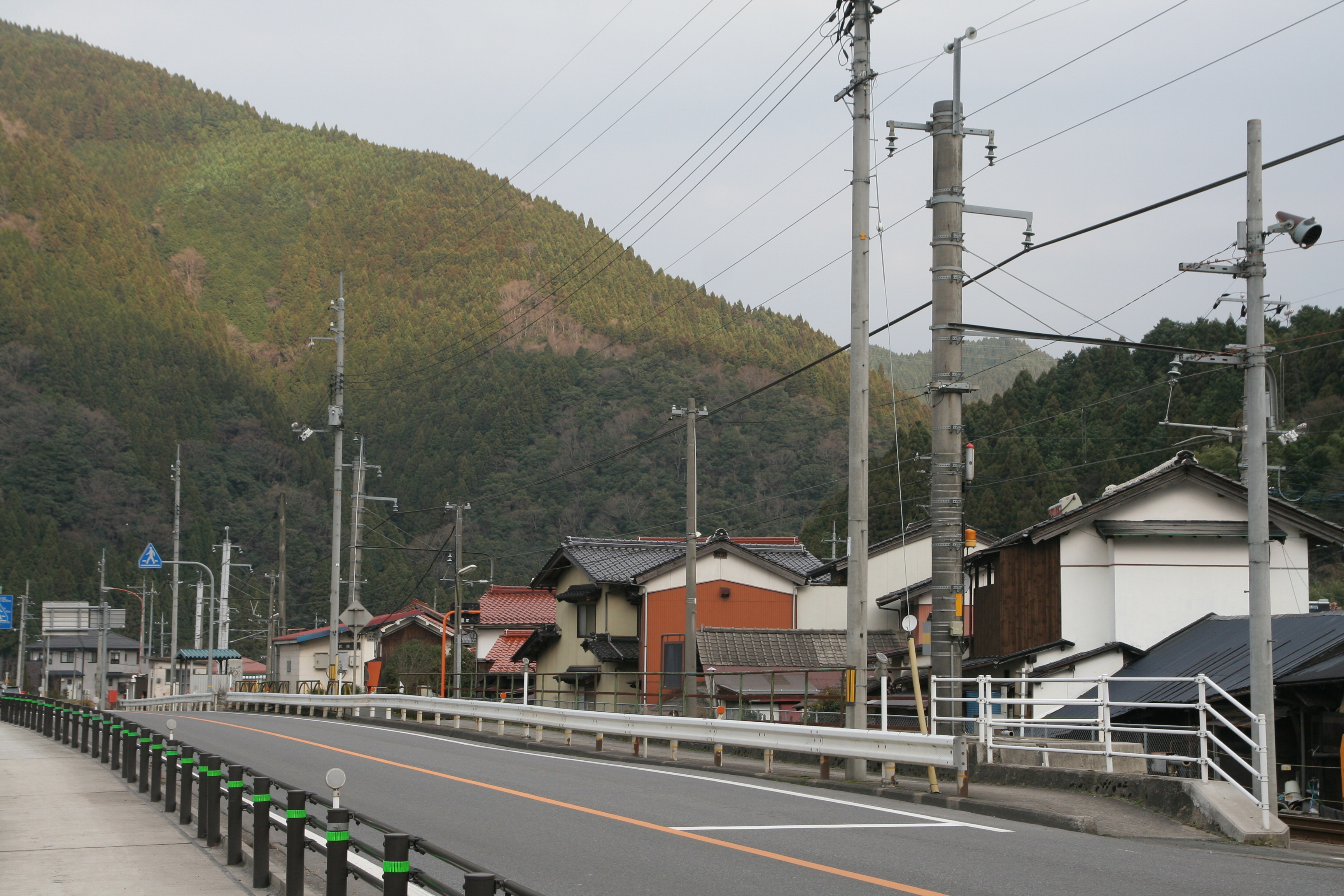 JR西日本 伯備線、武庫駅全体の様子（伯備線内では唯一の1面1線の駅）。並行する道路は国道181号（国道183号重複）。